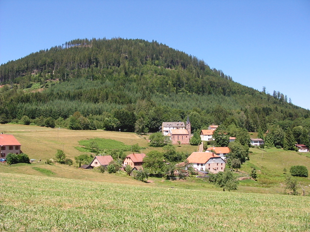 Le Climont Sommet du massif des Vosges Le hameau de Climont et son église protestante sont sur le territoire d'Urbeis (67) Photographie personnelle, prise le 17 juillet 2006 Copyright © Christian Amet